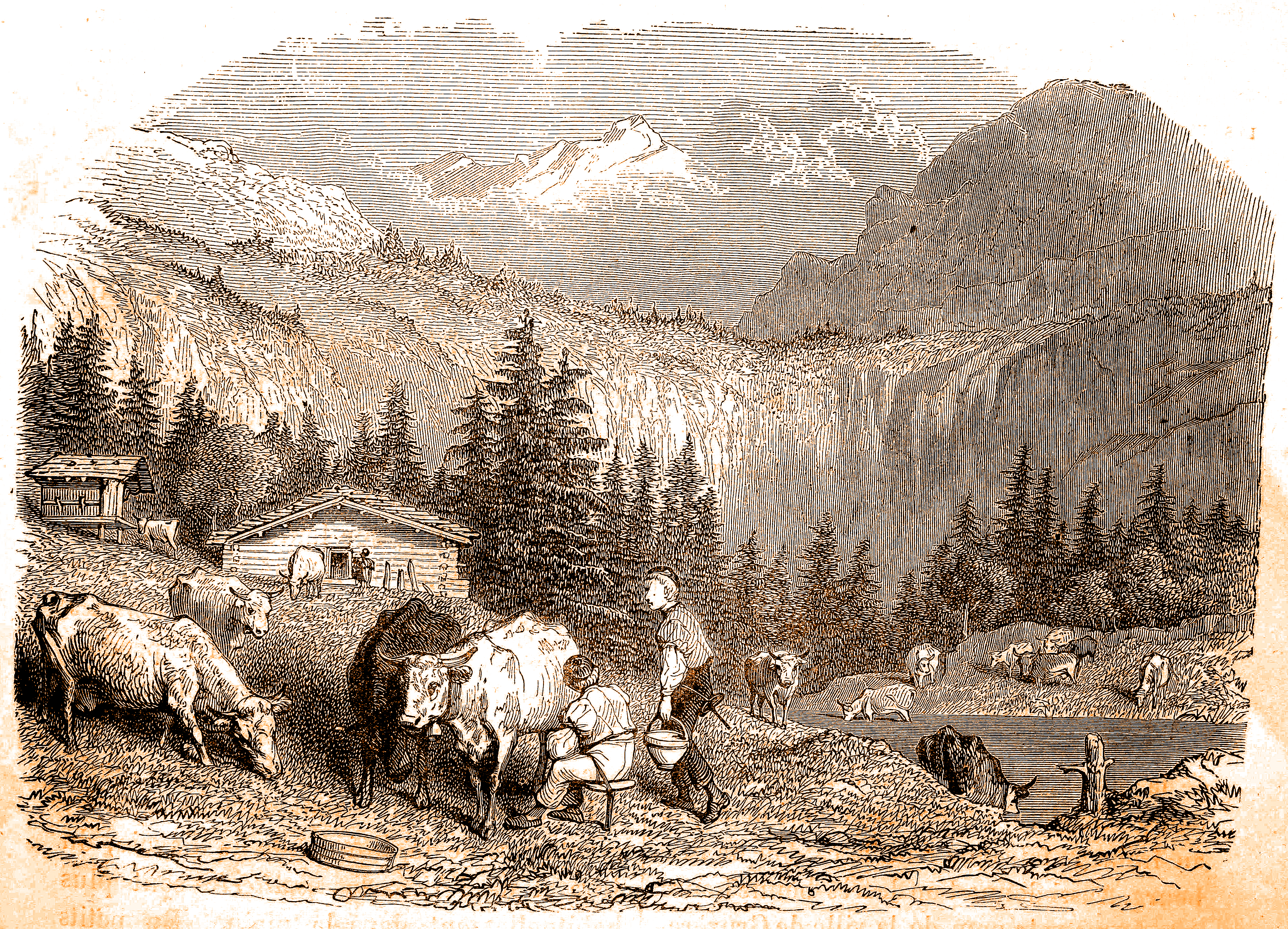 Traite des vaches dans les Alpes au XIXe siècle. Les merveilles de l'industrie ou, Description des principales industries modernes / par Louis Figuier (1819-1894)